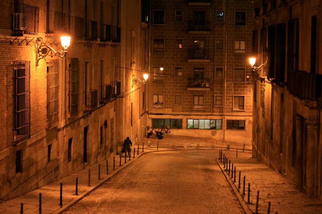 Calle Pretil de los Consejos, Madrid, de noche